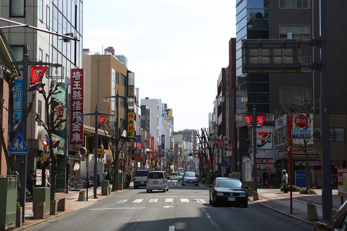 旧中山道浦和宿付近